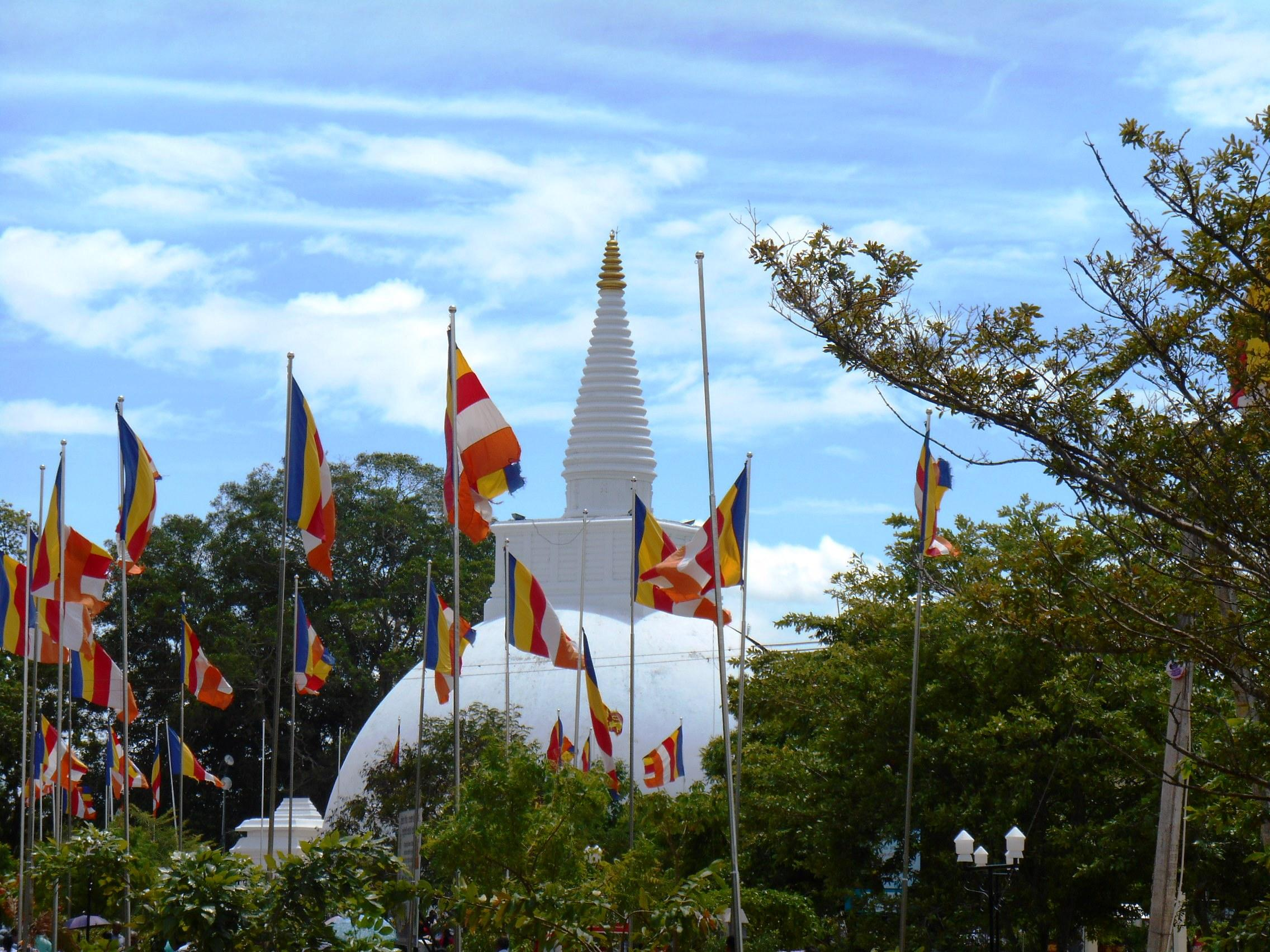 Photograph of Somawathiya Chethiya, Sri Lanka